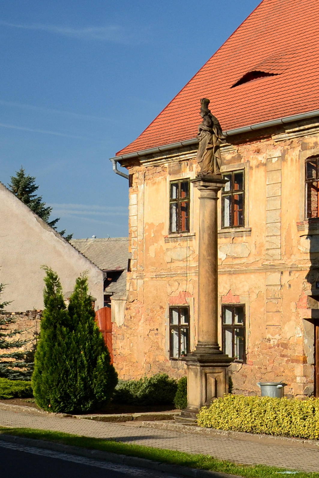 Sloup se sochou Panny Marie před č. p. 5 v Černovicích